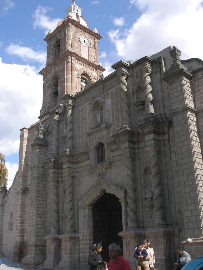 Fachada principal de la iglesia de la Preciosa Sangre de Cristo, en México DF.